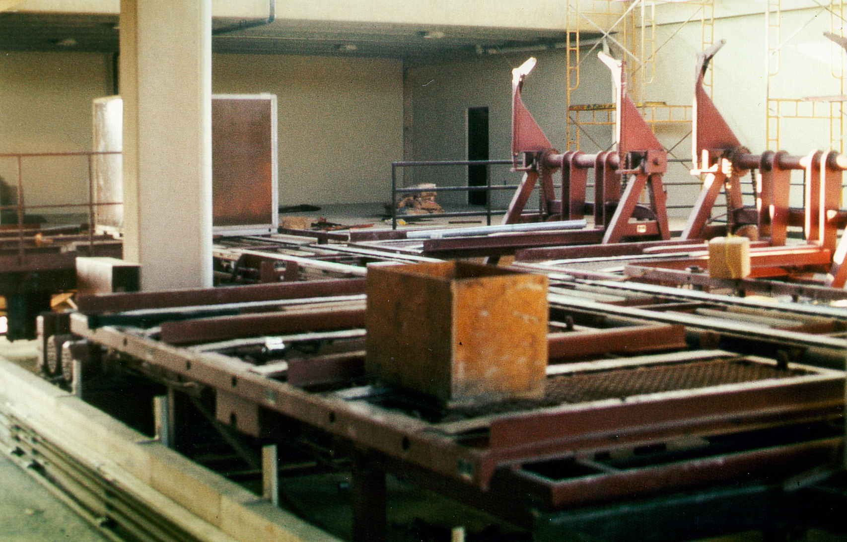 Airtrans Baggage Depot